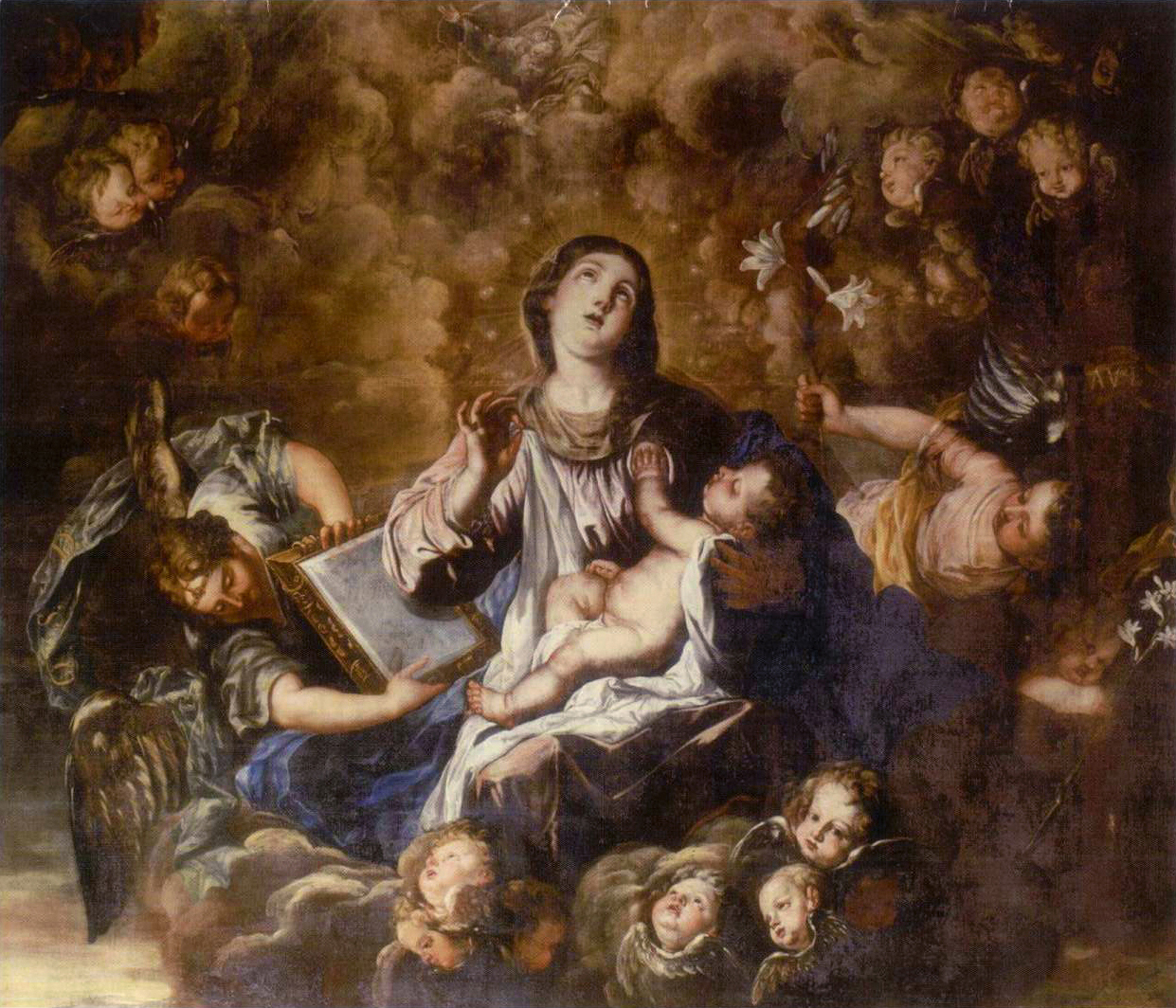 Pintura realizada entre 1651 y 1675.